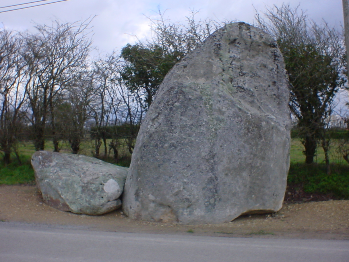 Menhir de Cheavanou Face Ouest au Hameau de la Croterie en CHAUVE 44